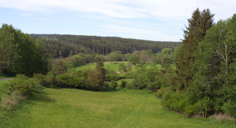 Údolí Javornice mezi Březskem a Milíčovem.